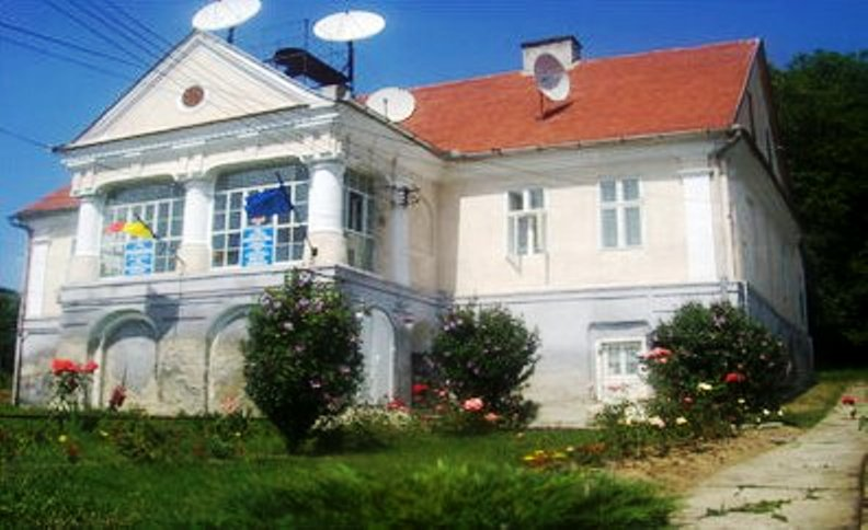 Backamadaras, Horváth–Petrichevich-kúria